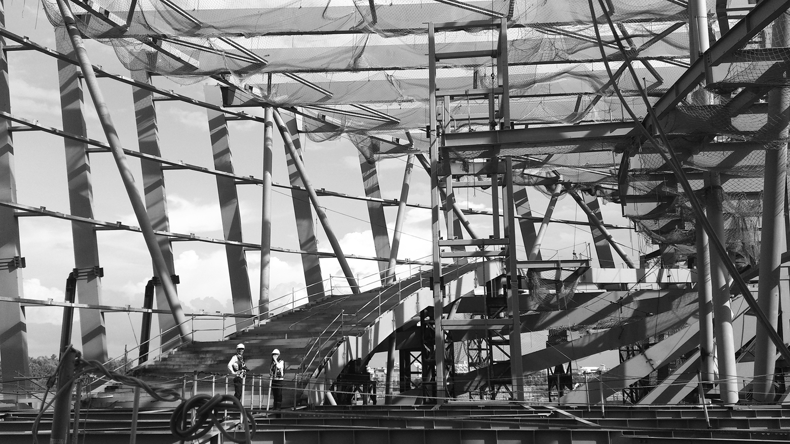 國立故宮博物院南部院區建築工地。